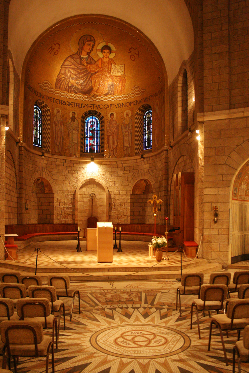 Abbaye de la Dormition à Jerusalem